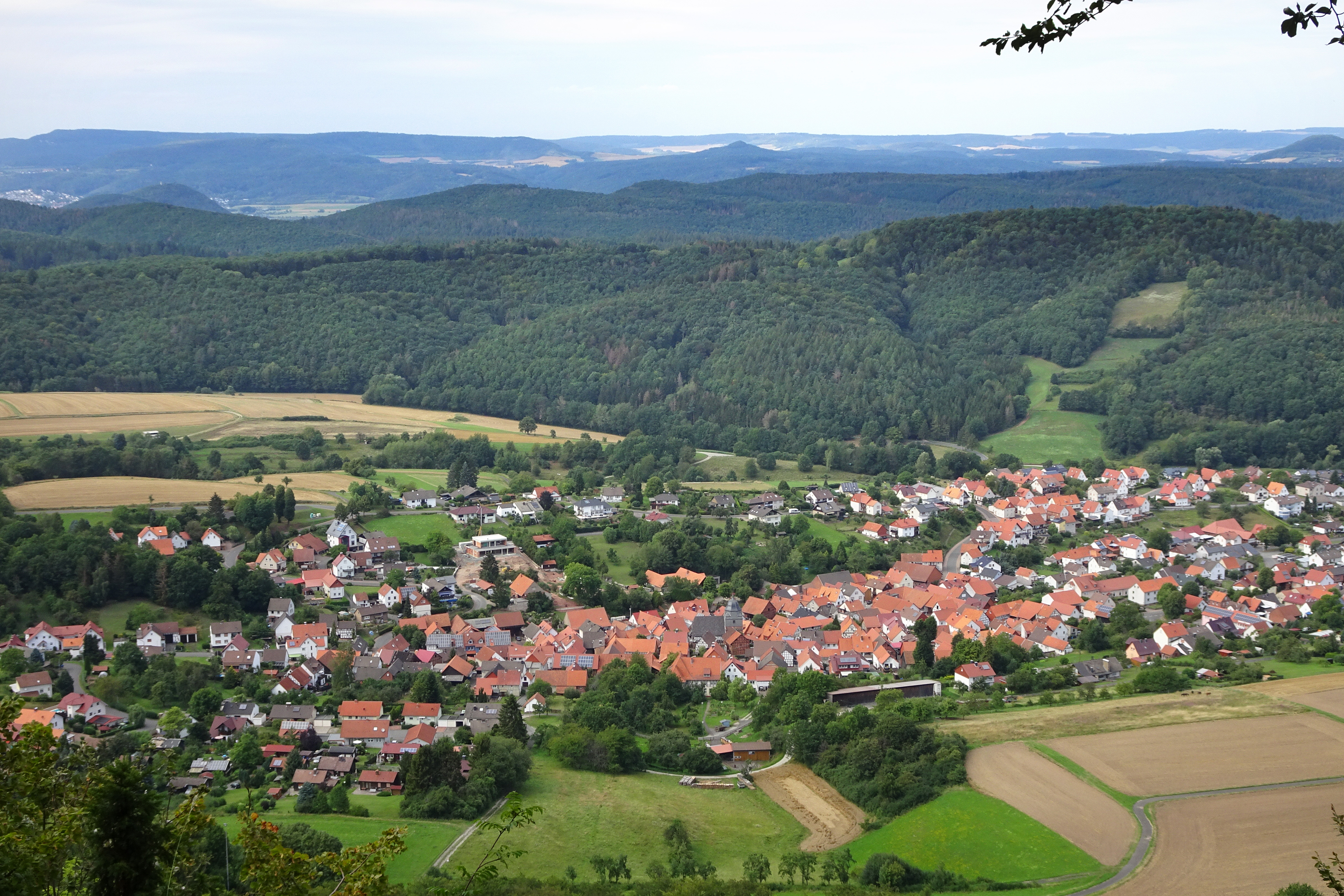 Die Graburg im nordhessischen Ringgau ist ein Bergstock aus Muschelkalk, der über einem Sockel aus Oberem Buntsandstein, der Röt genannt wird, liegt. Naturnahe Kalkbuchenwälder, Felsen und Bergstürze prägen das Gebiet in besonderer Weise. Wegen ihrer landschaftlichen Schönheit und Eigenart sowie ihrer Bedeutung als Lebensraum für seltene und bestandsgefährdete Tier- und Pflanzenarten wurde die Graburg in dem Jahr 1915 als Naturdenkmal und ab Mai 1965 als Naturschutzgebiet unter besonderen Schutz gestellt. Als Wuchsort seltener Pflanzengesellschaften und aufgrund ihres außergewöhnlichen floristischen Reichtums wird die Graburg zu den bedeutendsten Naturschutzgebieten in Hessen gezählt. Die hier vorhandenen zahlreichen Vegetationseinheiten, die in großer Vielfalt und einer charakteristischen Abfolge vorkommen, gelten als wertvoll für Forschung und Lehre. Als besonders schutzwürdig werden auch die orchideenreichen Kalkmagerrasen, der hessenweit größte Eibenbestand, die großen Bergstürze mit ihren Blaugrashalden sowie die zahlreichen Höhlen in den Felsbereichen als Winterquartiere für gefährdete Fledermausarten angesehen.